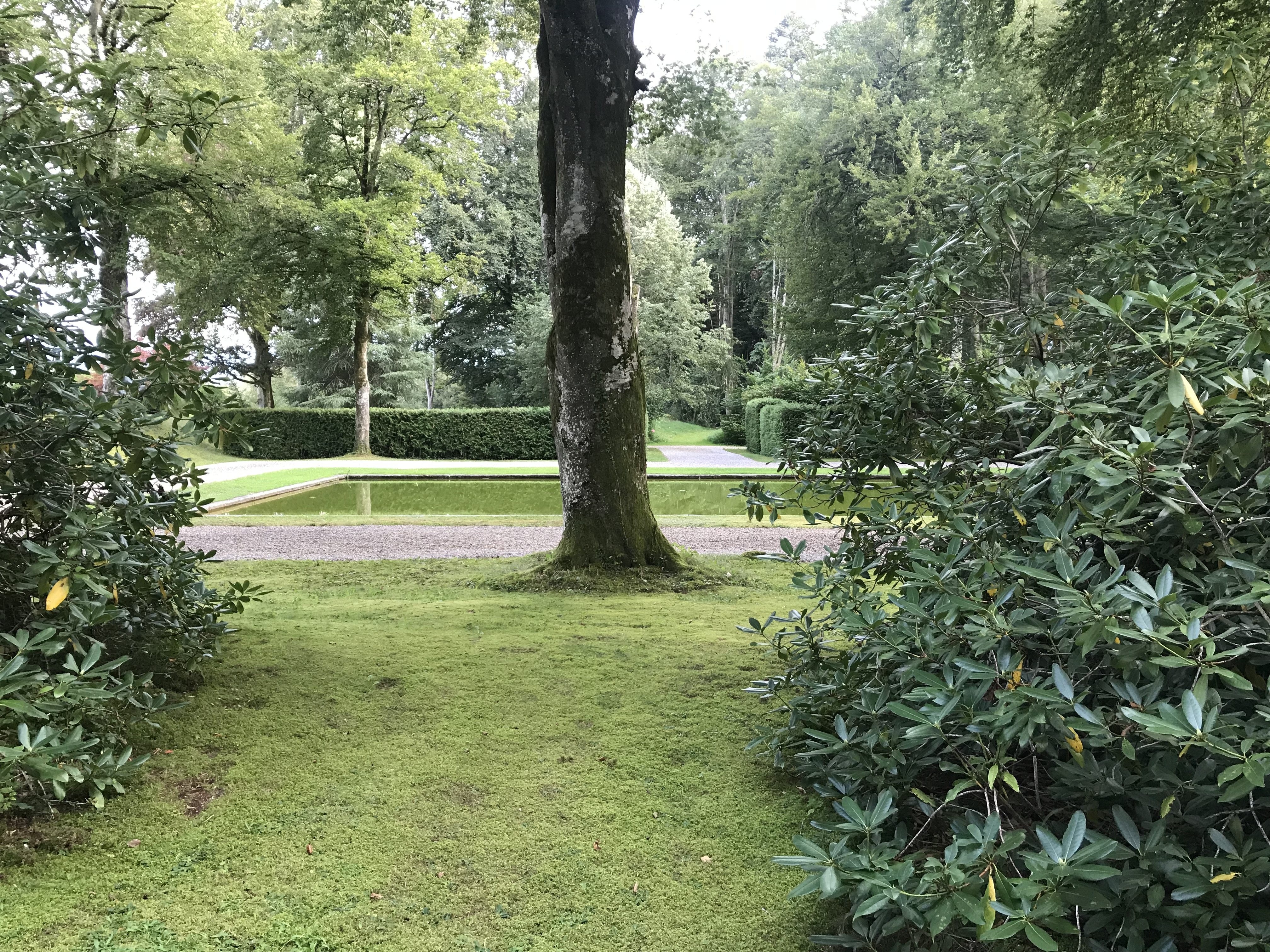 Le Bois-Murat miroir d'eau